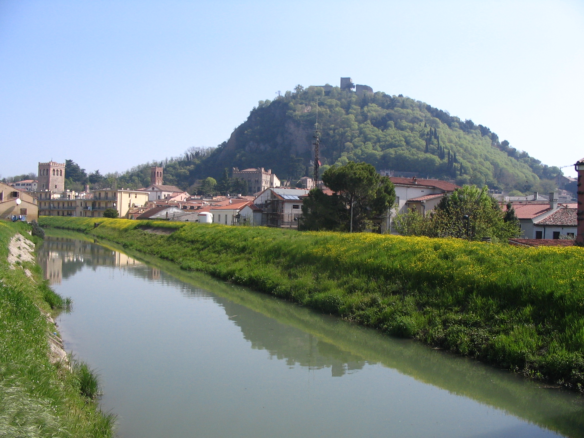 Monselice - Canale Bisatto - Province de Padoue - Italie